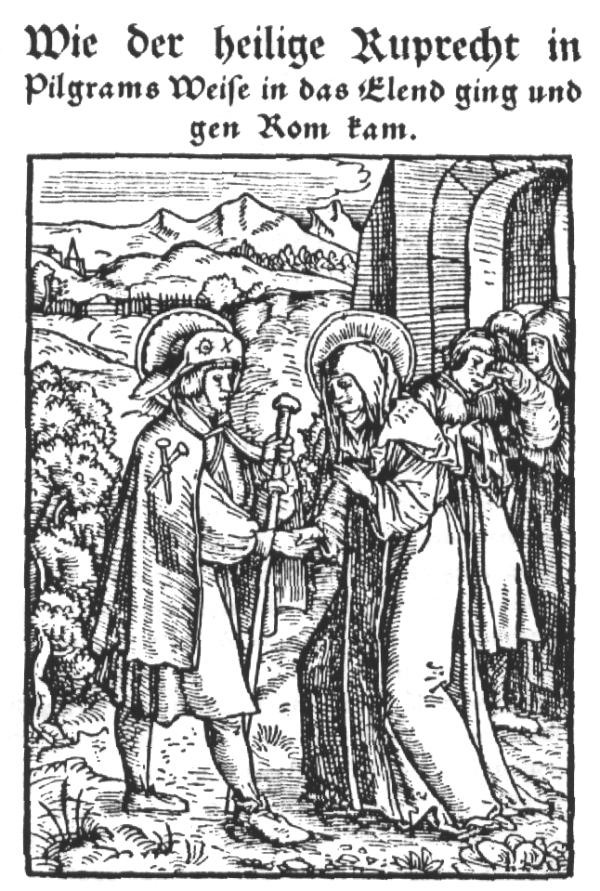 Abbild eines Holzschnitts von Jacob Köbel (1532)